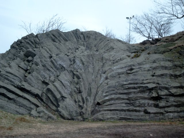 Der Hirtstein, fotografiert am 26.April 2003 von Steve Möckel.